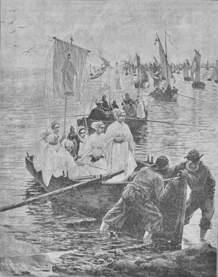 Procession à la mer à l'Île-Tudy vers 1905 (dessin de Louis Rivière, article Anne-Marie dans la revue "Saint-Nicolas", Paris, 1905)